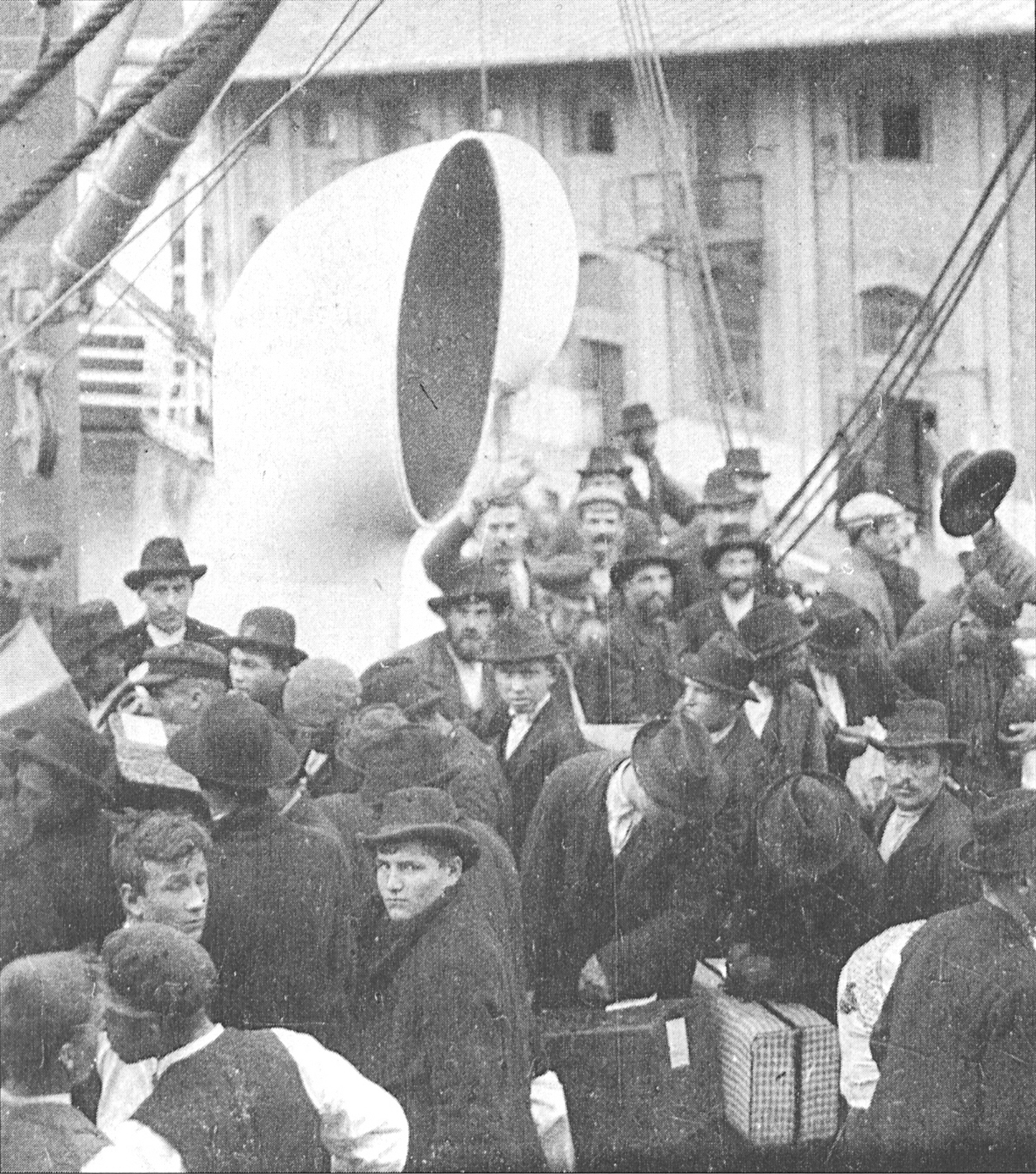 Auswanderer aus Österreich-Ungarn bei der Abreise in Triest auf einem Schiff der Austro-Americana (vermutlich / maybe: S.S. Slavonia) / Austro-Hungarian Emigrants